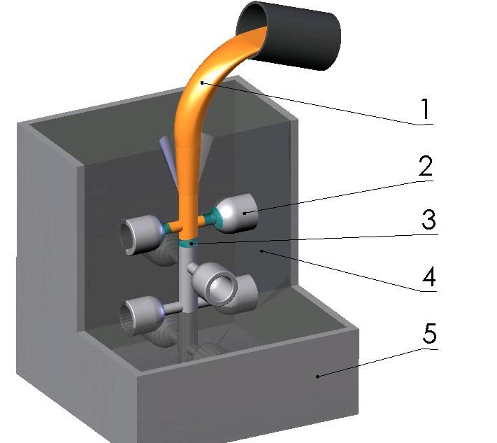 Schematische Darstellung des 'Vollformgiessens'. Selbst gezeichnet. 11.11.2005